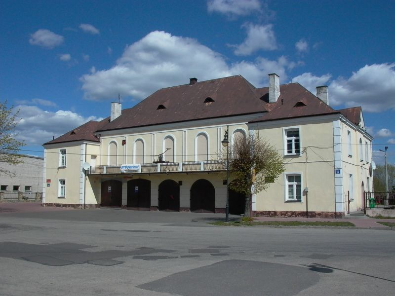 Remiza strażacka w Górze Kalwarii